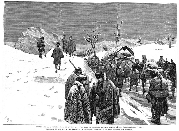 Paso de un convoy por el alto de Urquiola, 8 de febrero de 1876, durante la Tercera Guerra Carlista, dibujo al natural de José Luis Pellicer, recogido en la revista española La Ilustración Española y Americana.